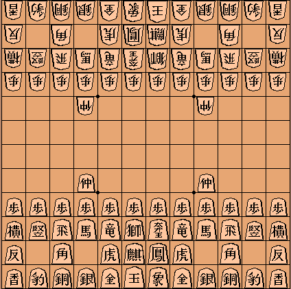 logiciel Shogi variants de Eteve Evans